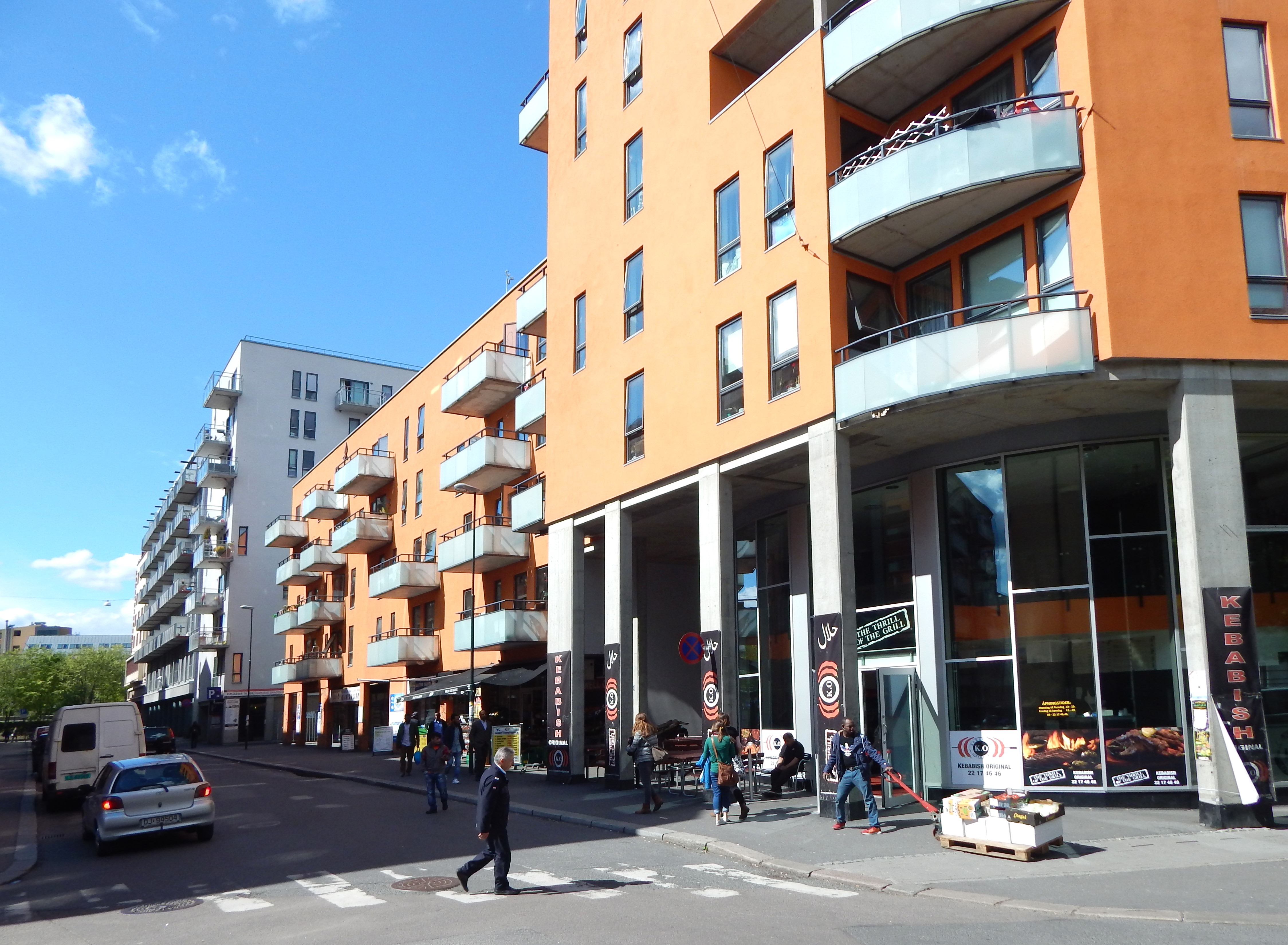 Breigata i krysset med Motzfeldts gate